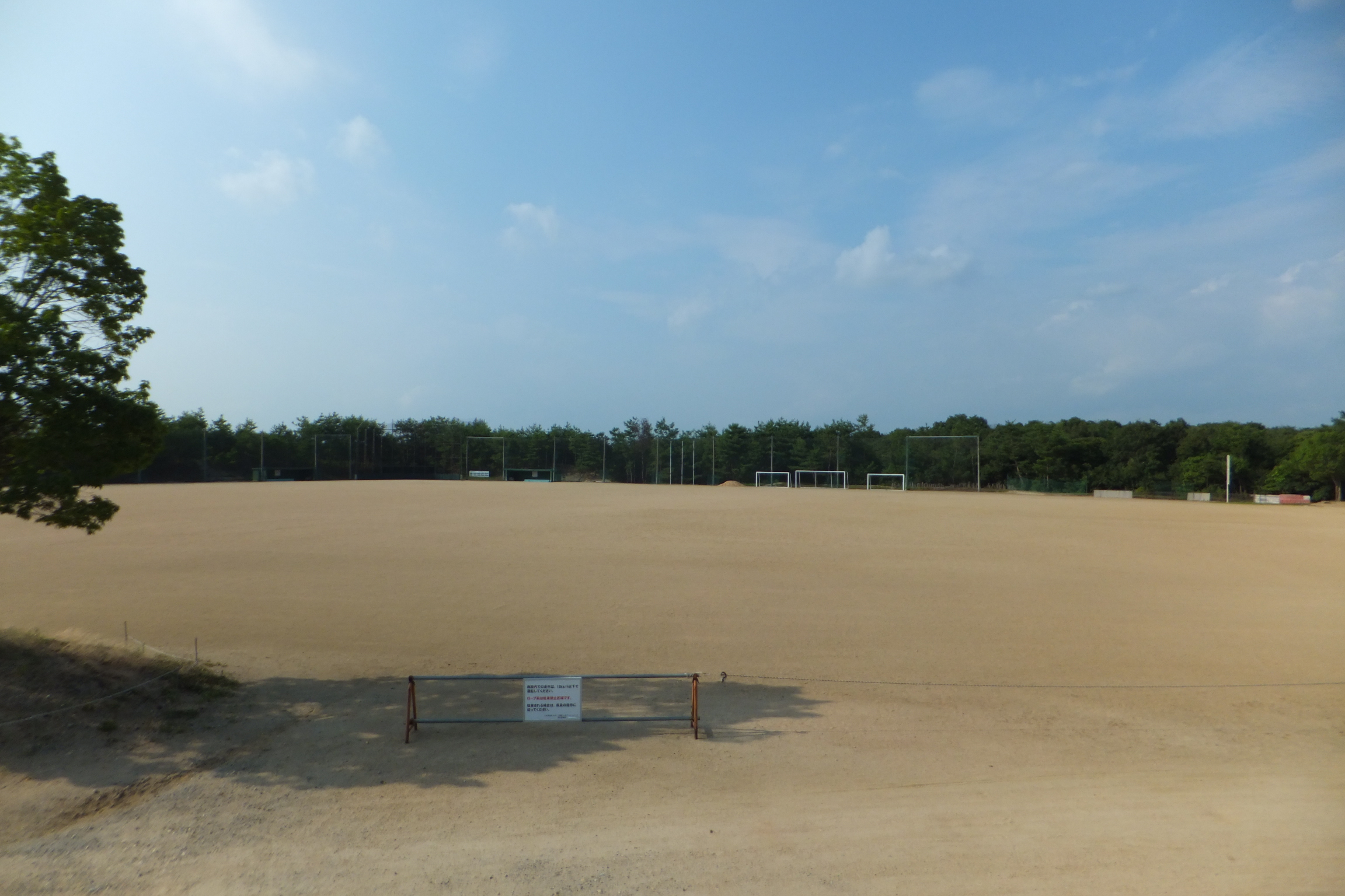 三木グリーンパーク